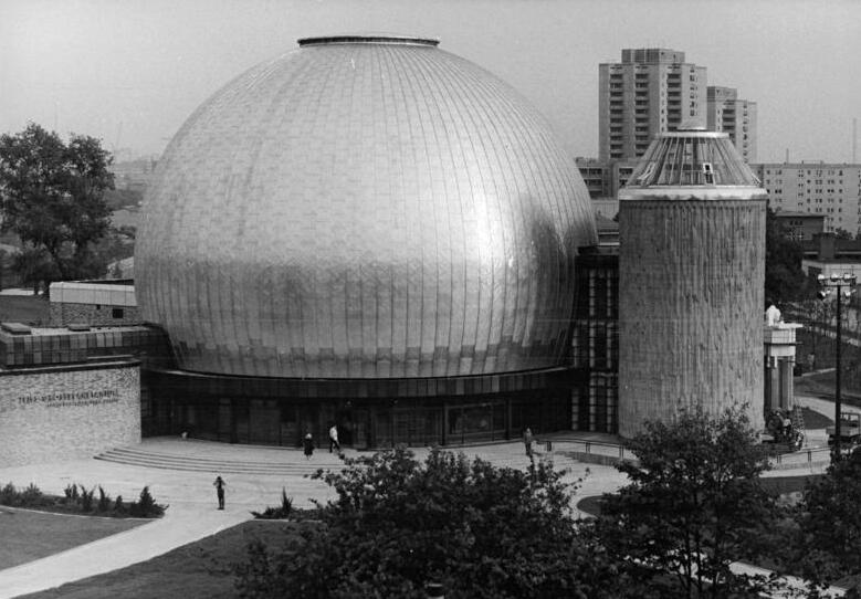 Berlin, Zeiss-Großplanetarium ADN-ZB Settnik 8.10.87 Berlin. Eröffnung des Zeiss-Großplanetariums-Mit der Eröffnung des Zeiss-Großplanetarium im Ernst-Thälmann-Park ist die Hauptstadt um eine Attraktion reicher. Unter der im Durchmesser 30 Meter großen silbrig glänzenden Kuppel befindet sich der Planetariumssaal mit dem Projetkionsgerät " Cosmorama", dem dritten seiner Art in der Welt. Das Sternentheater bietet rund 300 Zuschauern Platz. Achtung: Sperrfirst 9.10.1987 11: 30 Uhr!!!